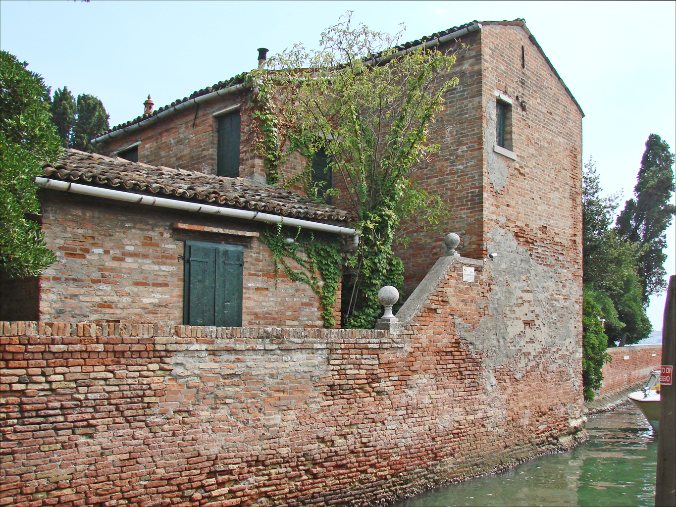 La maison sur la lagune du "Giardino Eden" (le jardin d'Eden) (Photo Annie Dalbéra) Cette propriété est composée d'une maison principale (photo) et de deux maisons secondaires situées sur un vaste terrain donnant au sud sur la lagune de Venise et dont l'entrée se trouve Rio della Croce. Elle est située sur l'île de la Giudecca, près de l'église du Rédempteur et de la prison aujourd'hui désaffectée dont elle est mitoyenne. Elle a été achetée par un couple d'aristocrates anglais : Sir Frederic Eden (1828-1916) et son épouse Caroline (1837-1928) en 1884 qui l'a mise en valeur en créant un jardin devenu célèbre et dont F. Eden a raconté l'histoire dans un ouvrage publié en 1903. En 1928, à la mort de son épouse Caroline, la propriété a changé plusieurs fois de propriétaire. Le dernier d'entre eux a été le peintre autrichien Hundertwasser qui l'a occupée à partir de 1979 jusqu'à sa mort en 2000. Aujourd'hui elle appartient à la fondation Hundertwasser mais il n'est pas possible de la visiter. Le jardin est cité dans l'ouvrage "Venise, insolite et secrète", de Thomas Jonglez et Paola Zoffoli Editions Jonglez, juin 2011 pages 364 et 365, Références du livre sur le jardin : "Un jardin à Venise" Titre original : "A garden in Venice" de Frédéric Eden publié pour la première fois en 1903 par la revue "Country Life et Georges Newnes Publié en fac similé par Frances Lincoln adresse Traduit de l'anglais et présenté par Marie-Thérèse Weal Edité en France par les éditions Actes Sud, Arles, 2005 Edité en Italie par les éditions Pendragon, Bologne (Un giardino a Venezia)